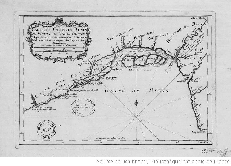 Carte du golfe de Bénin et partie de la côte de Guinée depuis la riv. de Volta jusqu'au c. Formosa, dressée sur les journ.x des navigat.rs / par N.B.- [s.n.] - 1740-1749